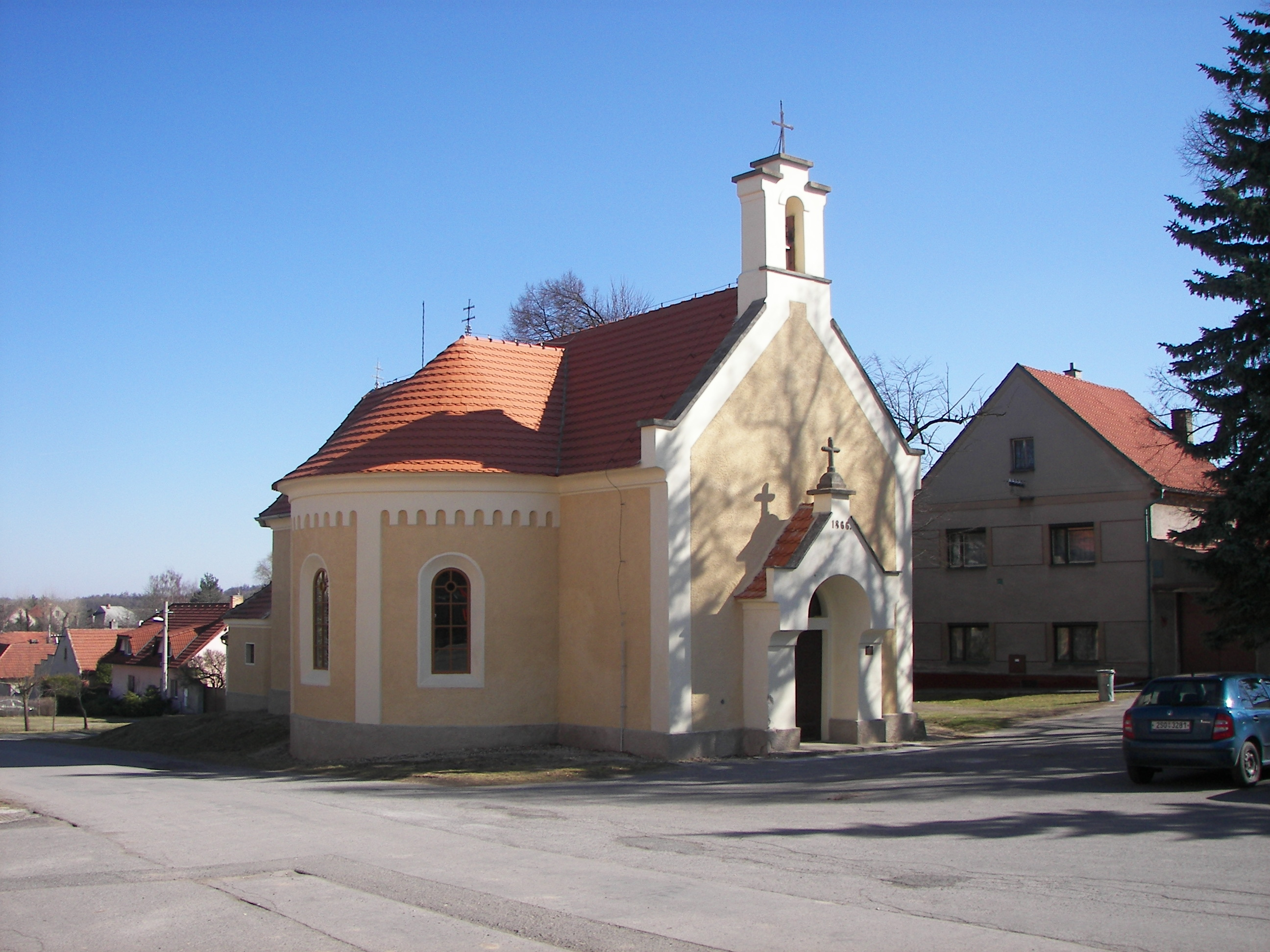 Kaple svatého Jana Křtitele v Ledcích